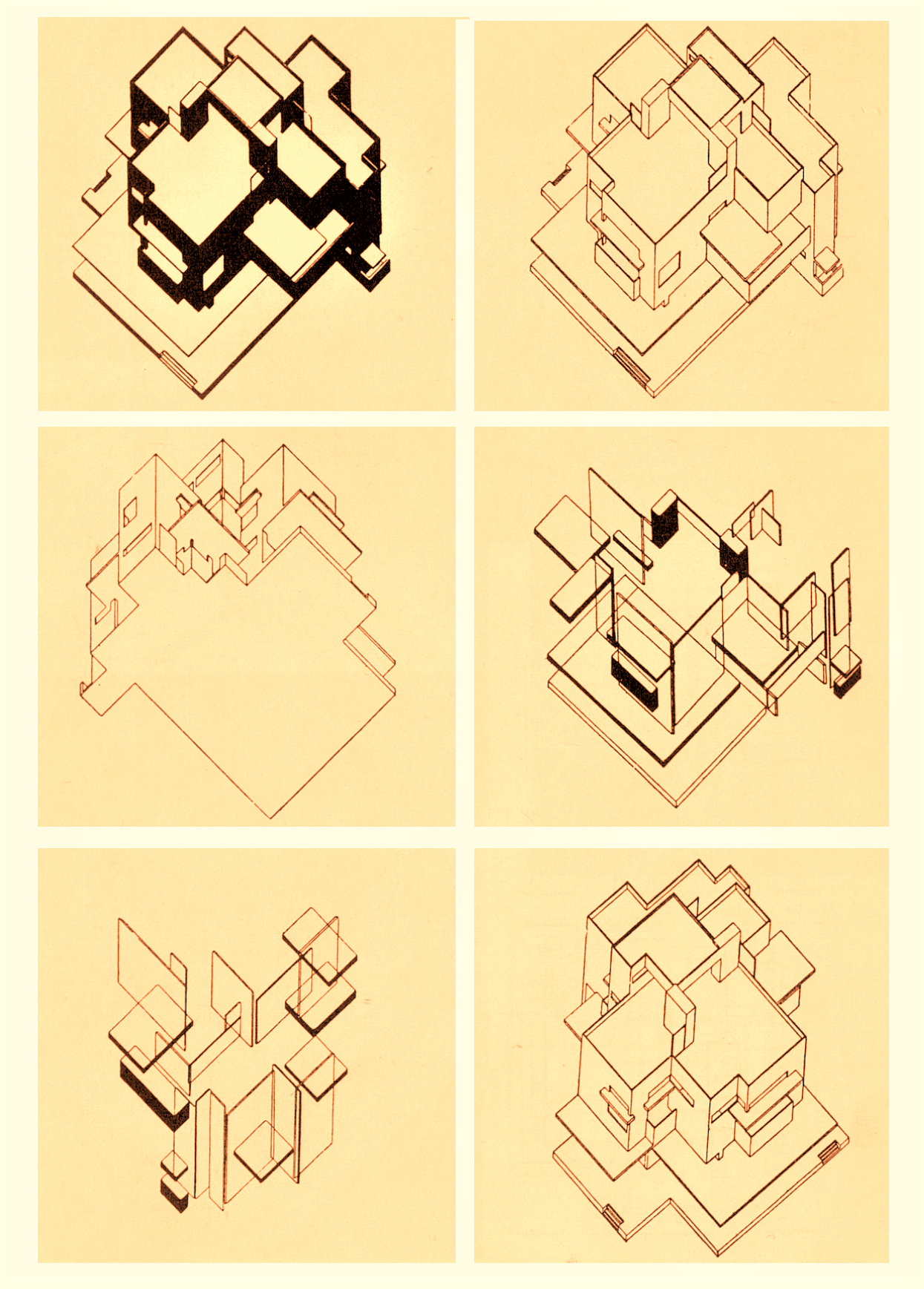 C. van Eesteren, T. van Doesburg, maison particulière 1923 (image du domaine public modifiée)